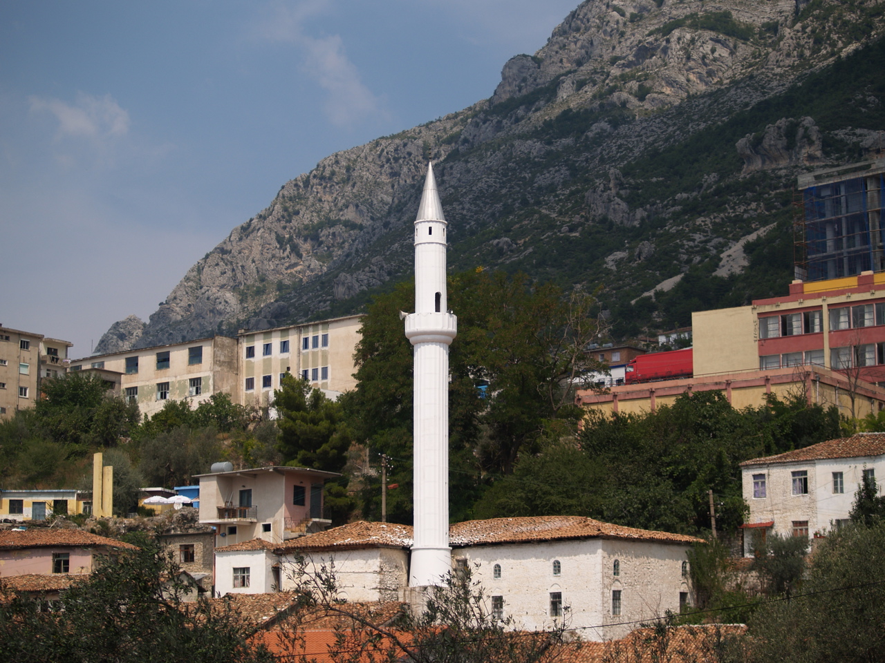 Kruje Albania